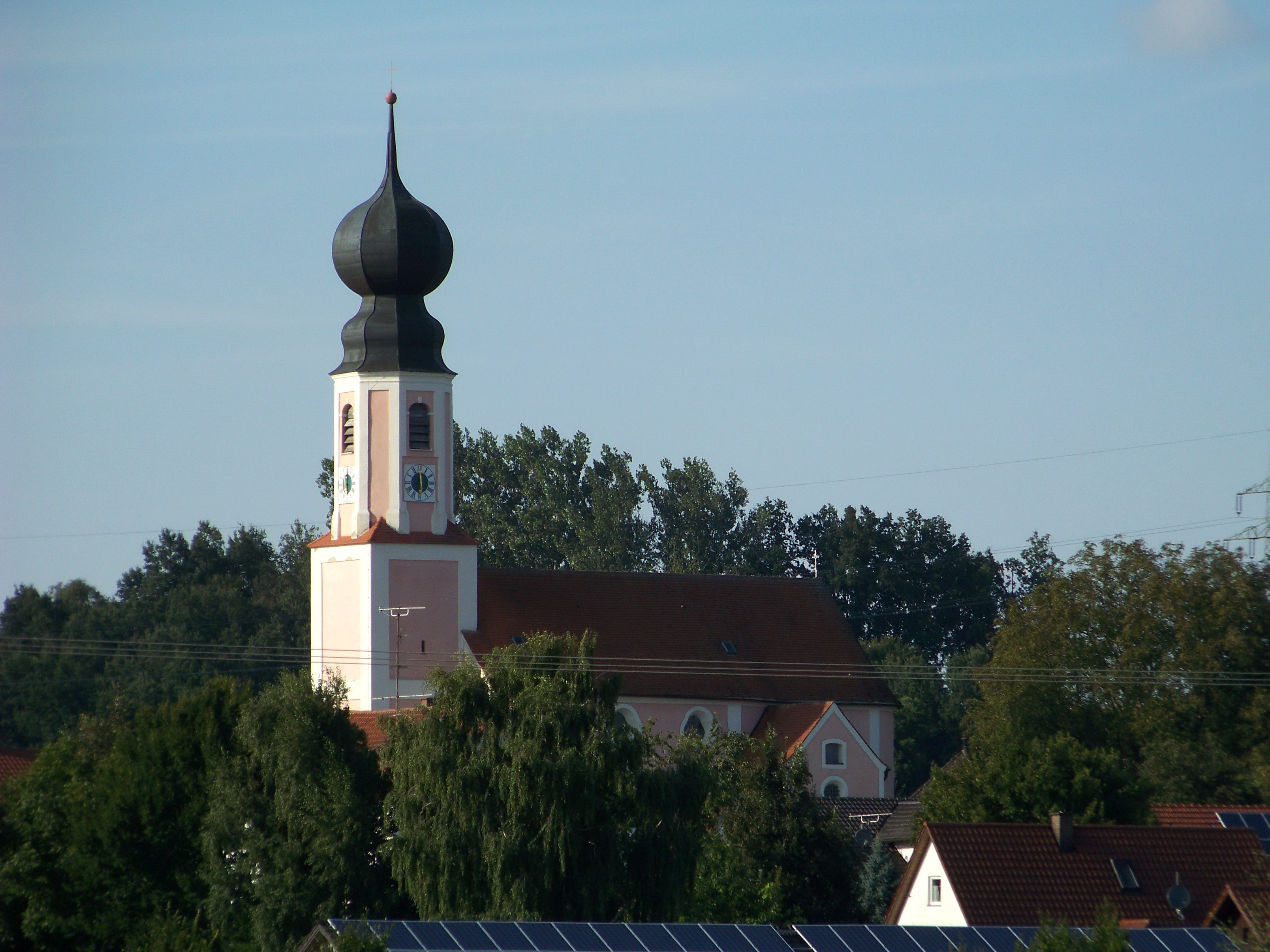 Neufahrn in Niederbayern, Hofendorf, Filialkirche St. Andreas. Neubau 1747 von Johann Georg Hirschstötter; mit Ausstattung.